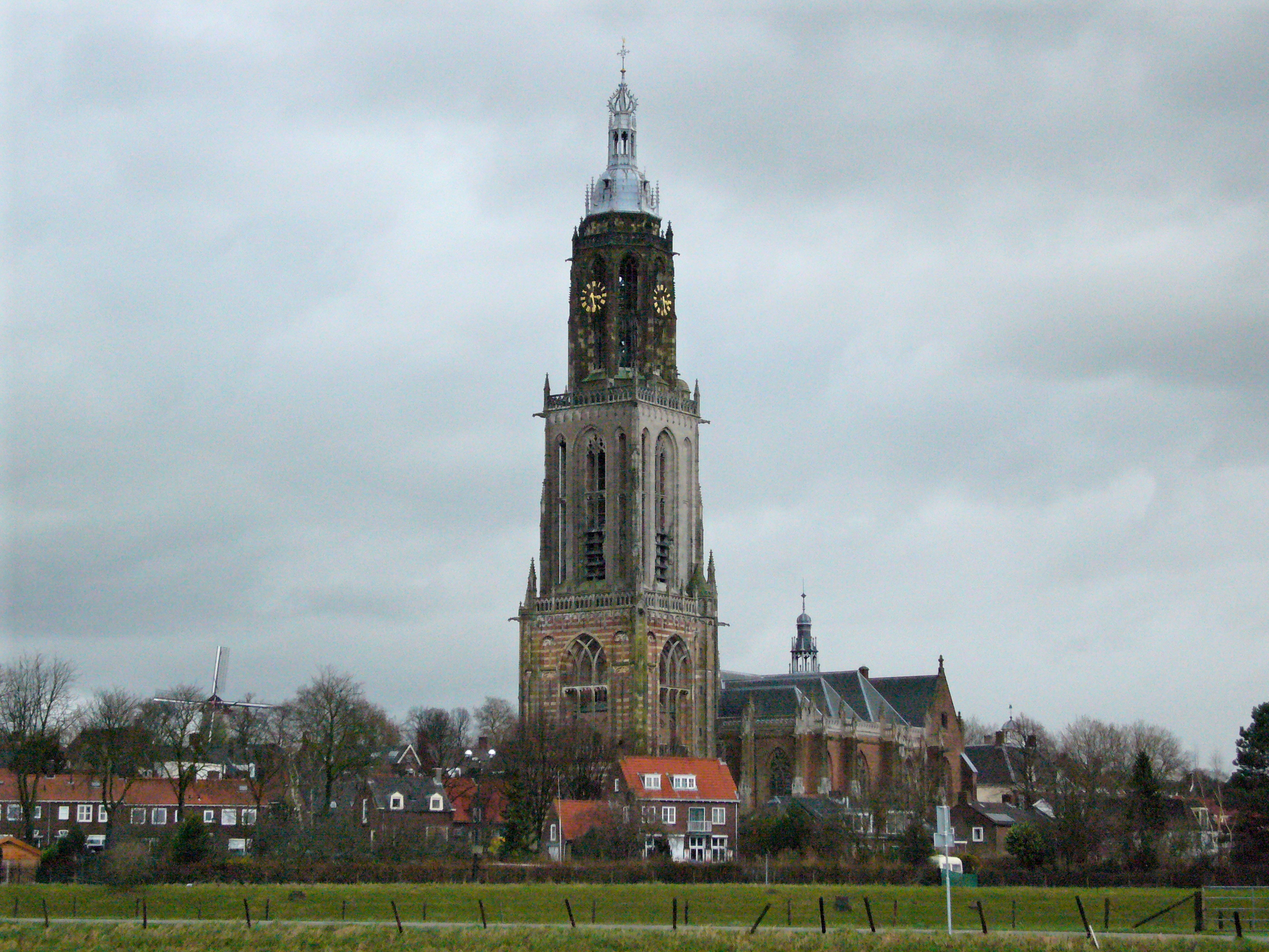 Cunerakerk in Rhenen